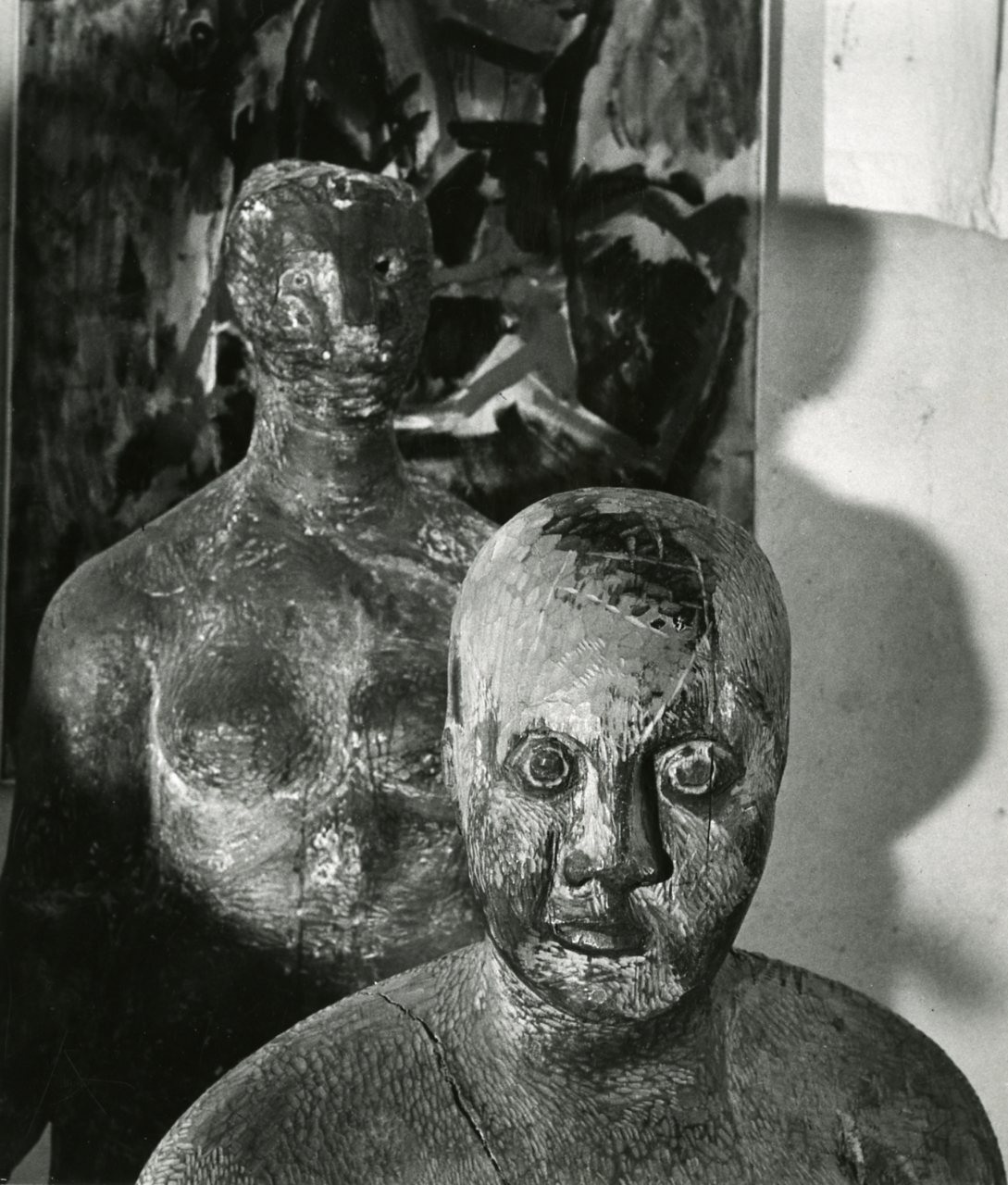 Servizio fotografico : Milano, 1963 / Paolo Monti. - Stampe: 2 : Positivo b/n, gelatina bromuro d'argento/ carta, 24x30. - ((Al verso delle stampe timbro a inchiostro con copyright: "© Copyright/ Credit to/ Paolo Monti/ Corso Sempione [...]/ Milano". - Sul coperchio della scatola iscrizione didascalica manoscritta a pennarello nero: "M. Marini". - Il negativo identificato con il numero 46397 è stato realizzato per Zodiac. - Fonte: Quaderno di Paolo Monti: Per Mostre: Negative scelte/ vari lavori professionali (s.d.), presso Archivio Paolo Monti